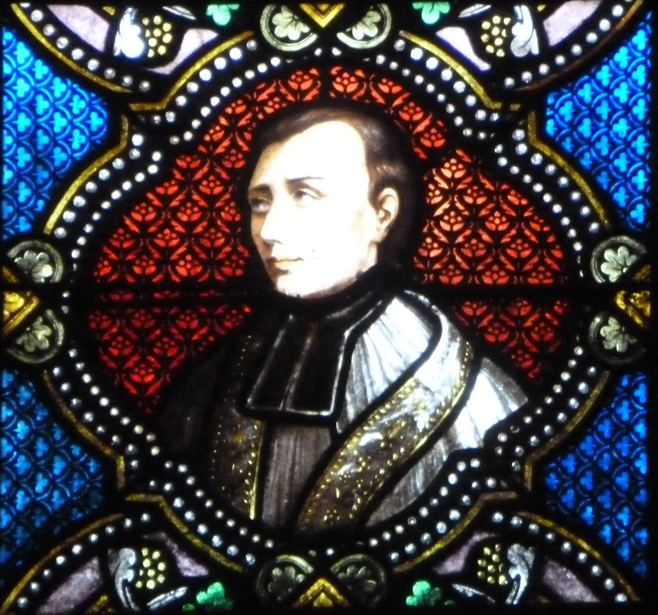 Médaillon d’un vitrail représentant le bienheureux Jean-Martin Moye.